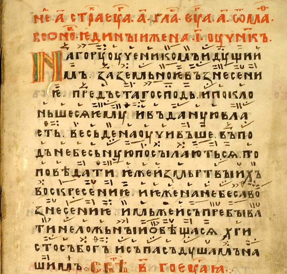 Первая Евангельская стихира,творение Леона цара, (под крюками). Стихирарь, устав., напис. 1303 года